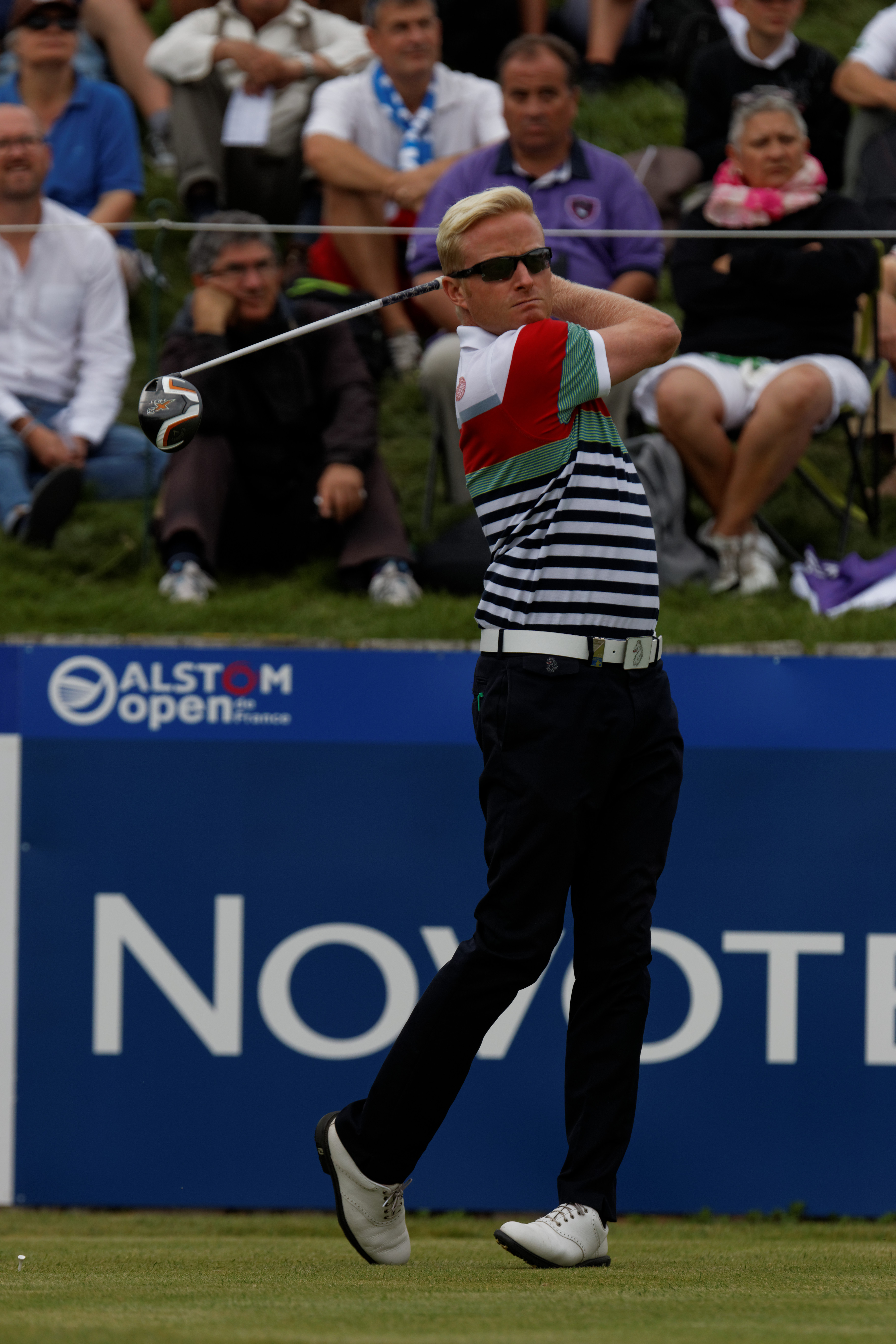 Simon Dyson lors du second tour de l'Open de France 2014 - Golf National - Saint-Quentin-en-Yvelines (78) - départ du trou n° 1